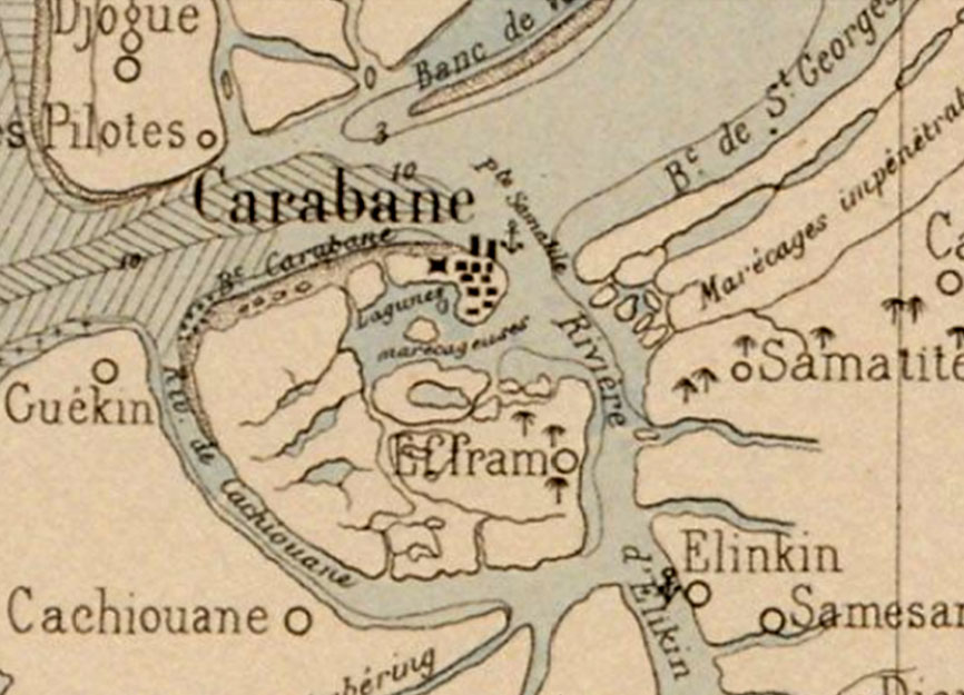 Carte ancienne de l'île de Carabane sur le fleuve Casamance (Sénégal)